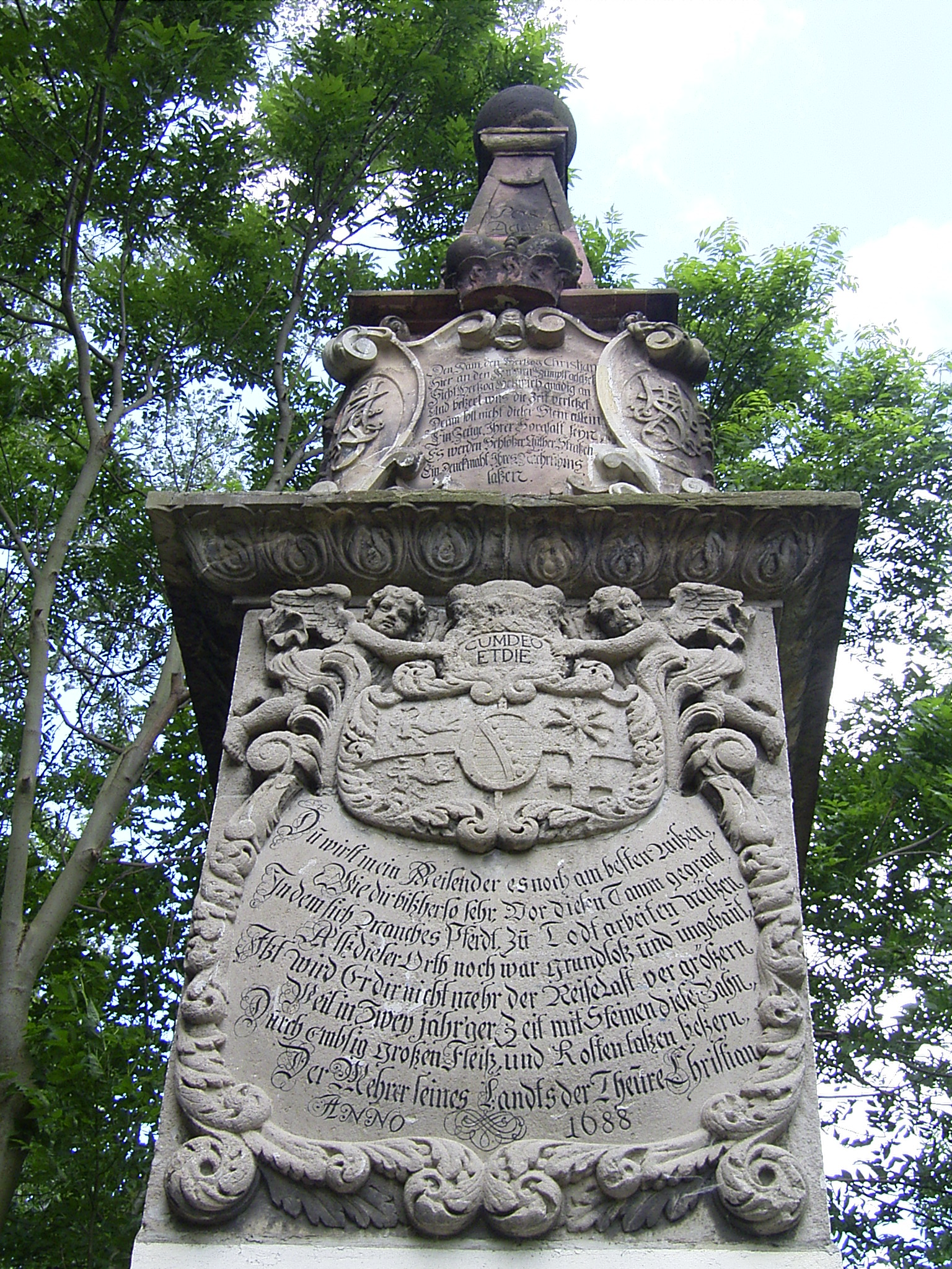 Denkmal Theurer Christian Radegast Anhalt